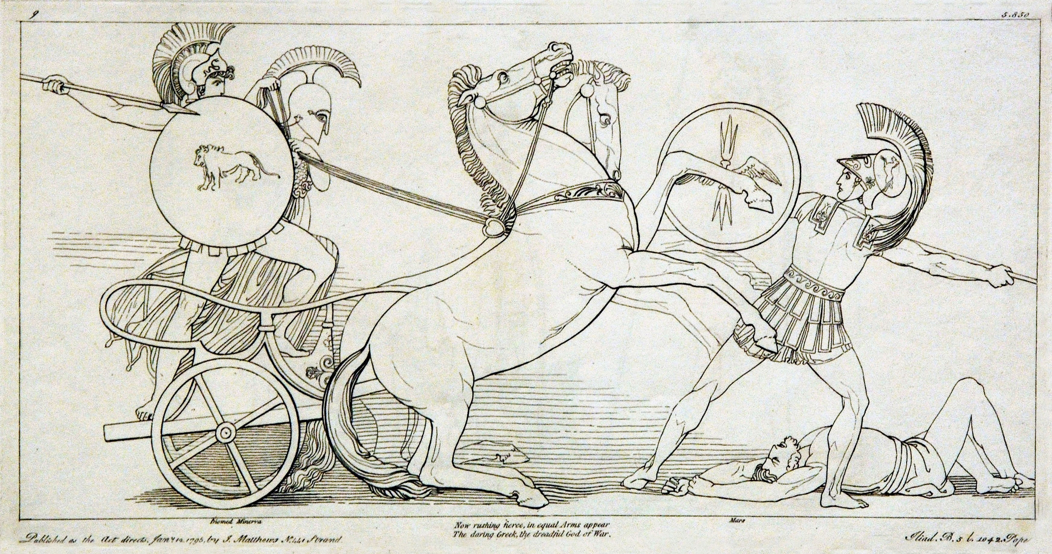 Kupferstich (1795) von Tommaso Piroli (1752 – 1824) nach einer Zeichnung (1793) von John Flaxman (1755 – 1826).